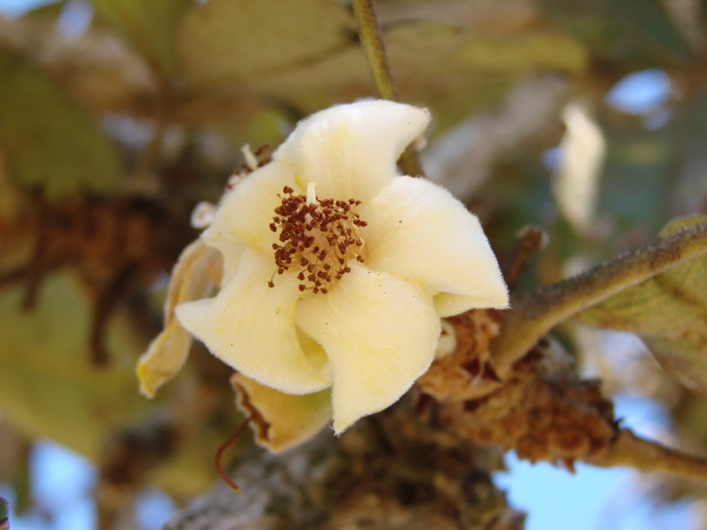 Eriotheca pubescens - MALVACEAE Parque Olhos D´Água - Brasília - Distrito Federal - Brasil.